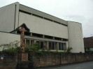 Neue Kirche Wernfeld